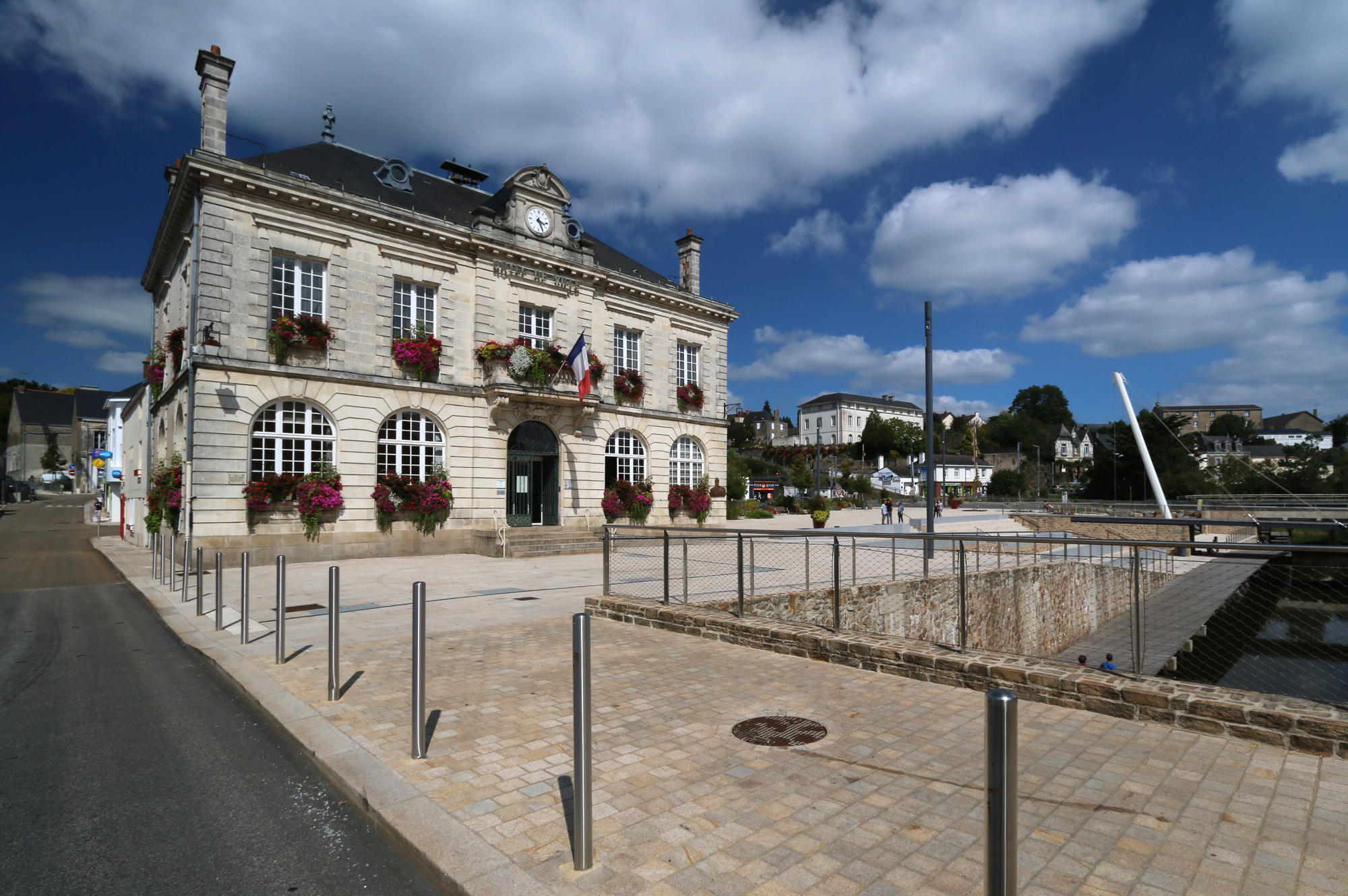 Mairie de Pontchâteau